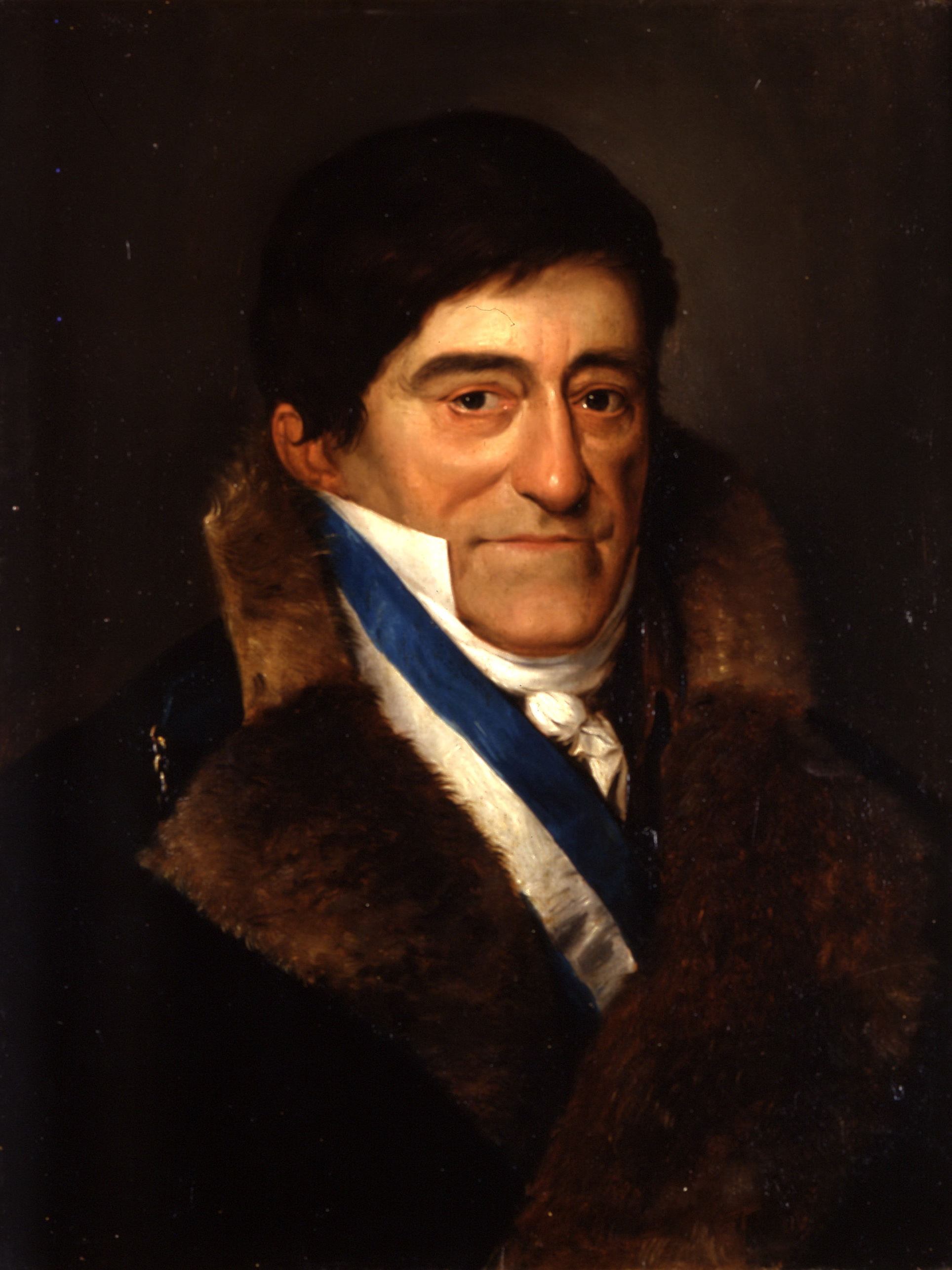 Retrato del marino español Juan José Ruiz de Apodaca y Eliza (1754–1835), primer conde del Venadito. Fue el 61º y último virrey de la Nueva España, jefe político superior de Nueva España (1820-1821) y el decimosexto capitán general de la Real Armada Española.